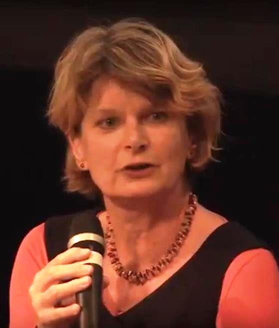 Kort na de Wereld Suïcide Preventie Dag (10 september) praat Coen Verbraak na de voorpremière van de film Voorland is Back met regisseur Susanne Heering over haar zus Annemartien, die op haar 32ste voor een trein sprong. Met psychiater Jim van Os, auteur Marian Donner, theoloog Christa Anbeek en Susanne Heering gaat hij in op de vraag hoe onze maatschappij anders ingericht moet worden om deze stijgende trend tegen te gaan.